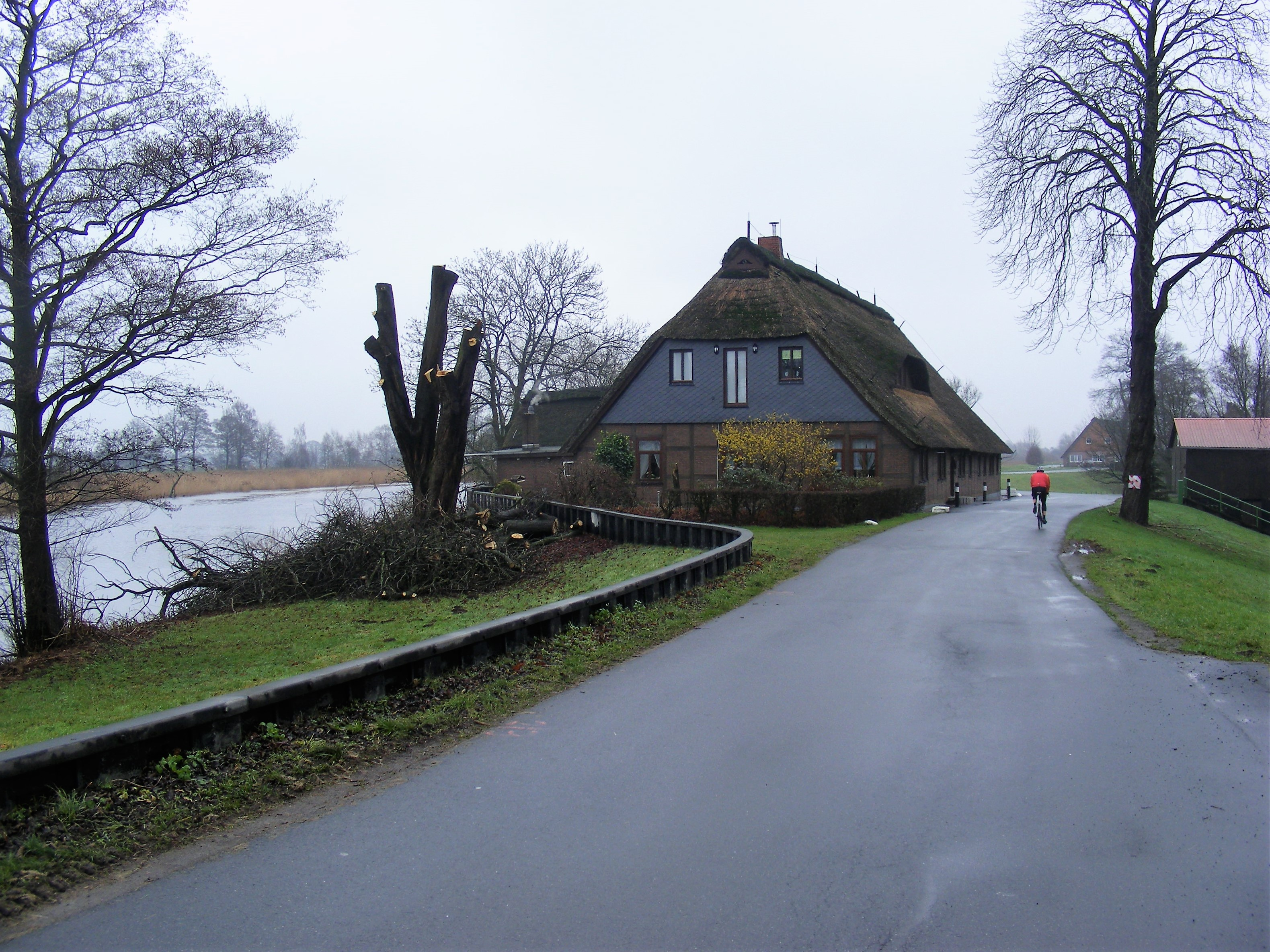 Straße Wümmensiede auf dem Wümmedeich im Bremer Blockland am 31. Dezember 2014, 12:30 Uhr, + 3°C.Links die Wümme.